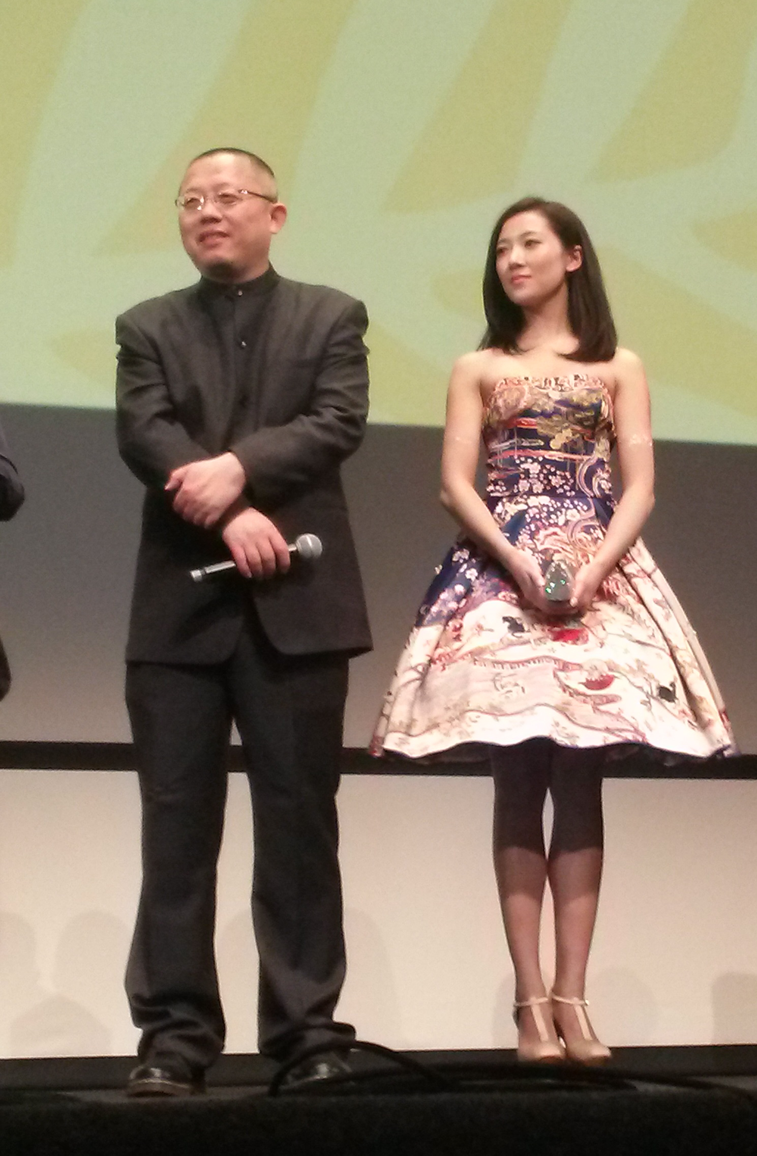 Le réalisateur Wang Chao et l'actrice Jian Renzi lors de la présentation de Fantasia au festival de Cannes 2014